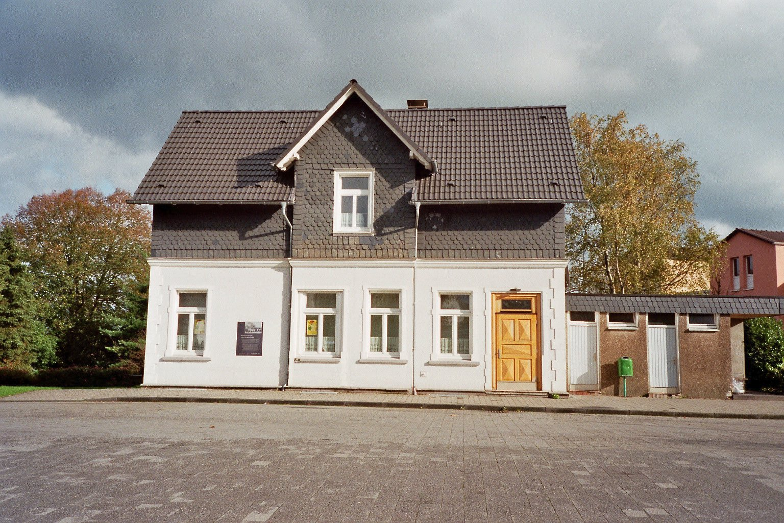 Der ehemalige Bahnhof von Breckerfeld der Kleinbahn Haspe-Voerde-Breckerfeld